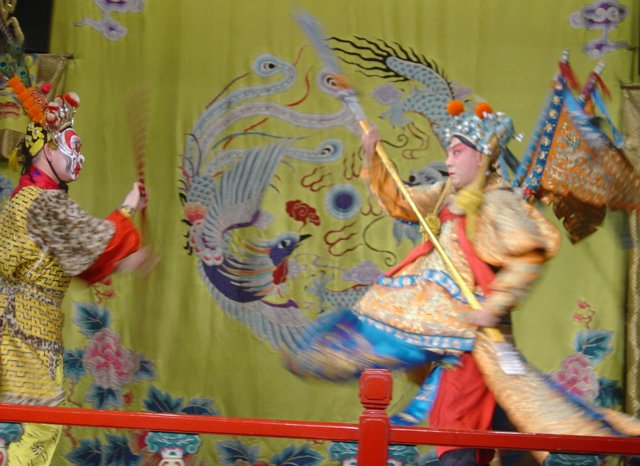 Photo:CMarmonier